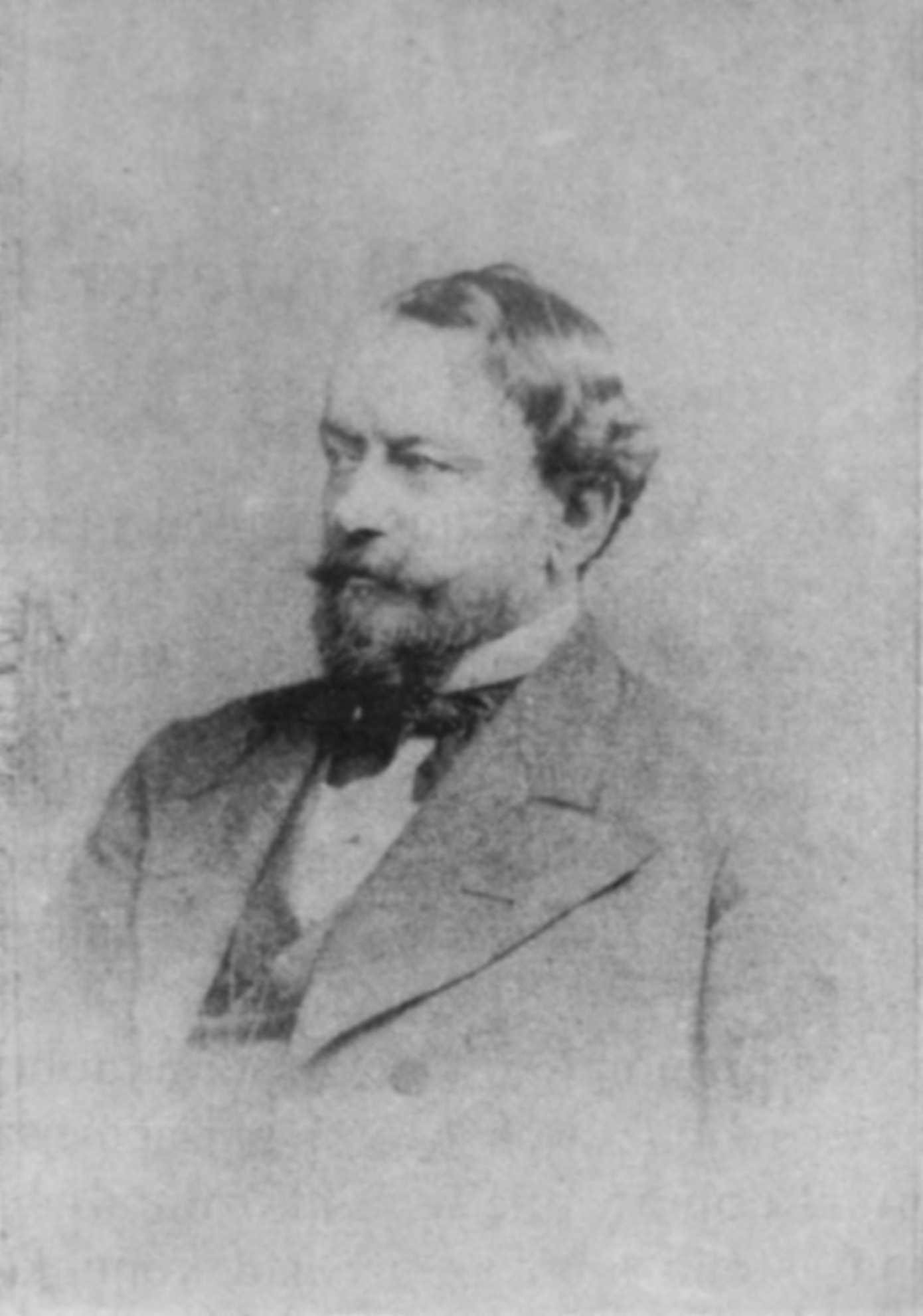 Hugo Solger (ur 8 lutego 1818 r. w Berlinie , zm. 13 stycznia 1898 r. tamże) był pruskim prawnikiem i parlamentarzystą, fotografia wykonana przez Carla Arazima w Dreźnie.